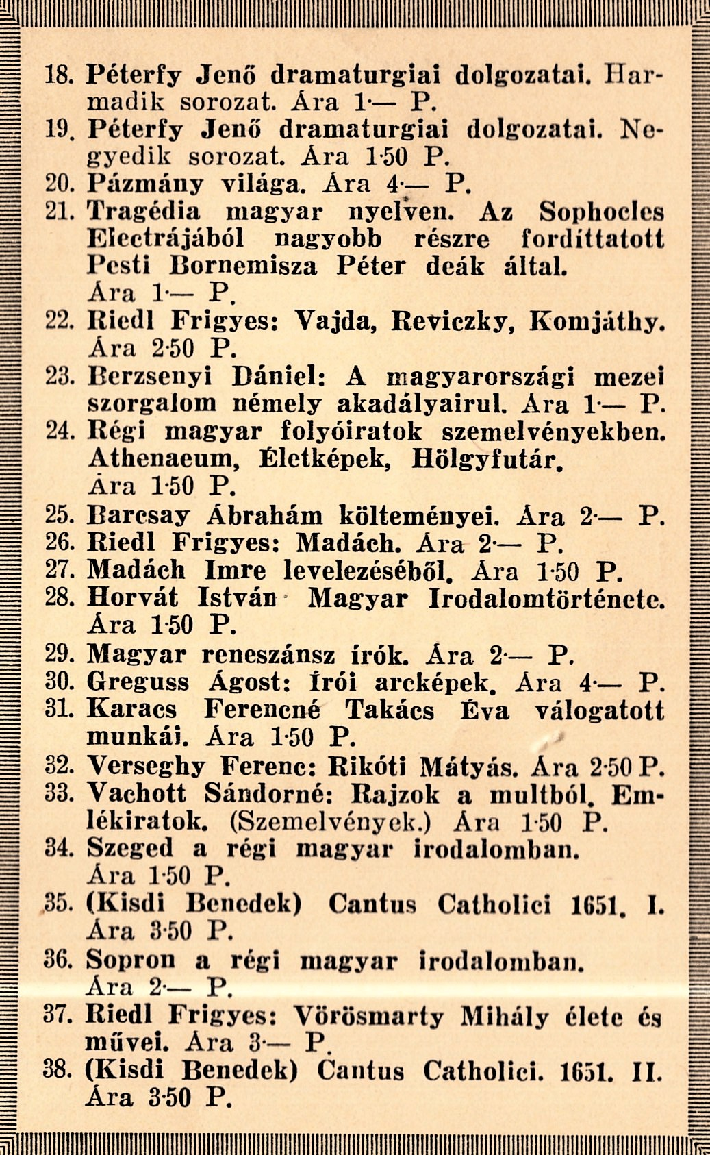 Magyar irodalmi ritkaságok, korabeli hirdetés, szerző nem ismert, 1930-as évek